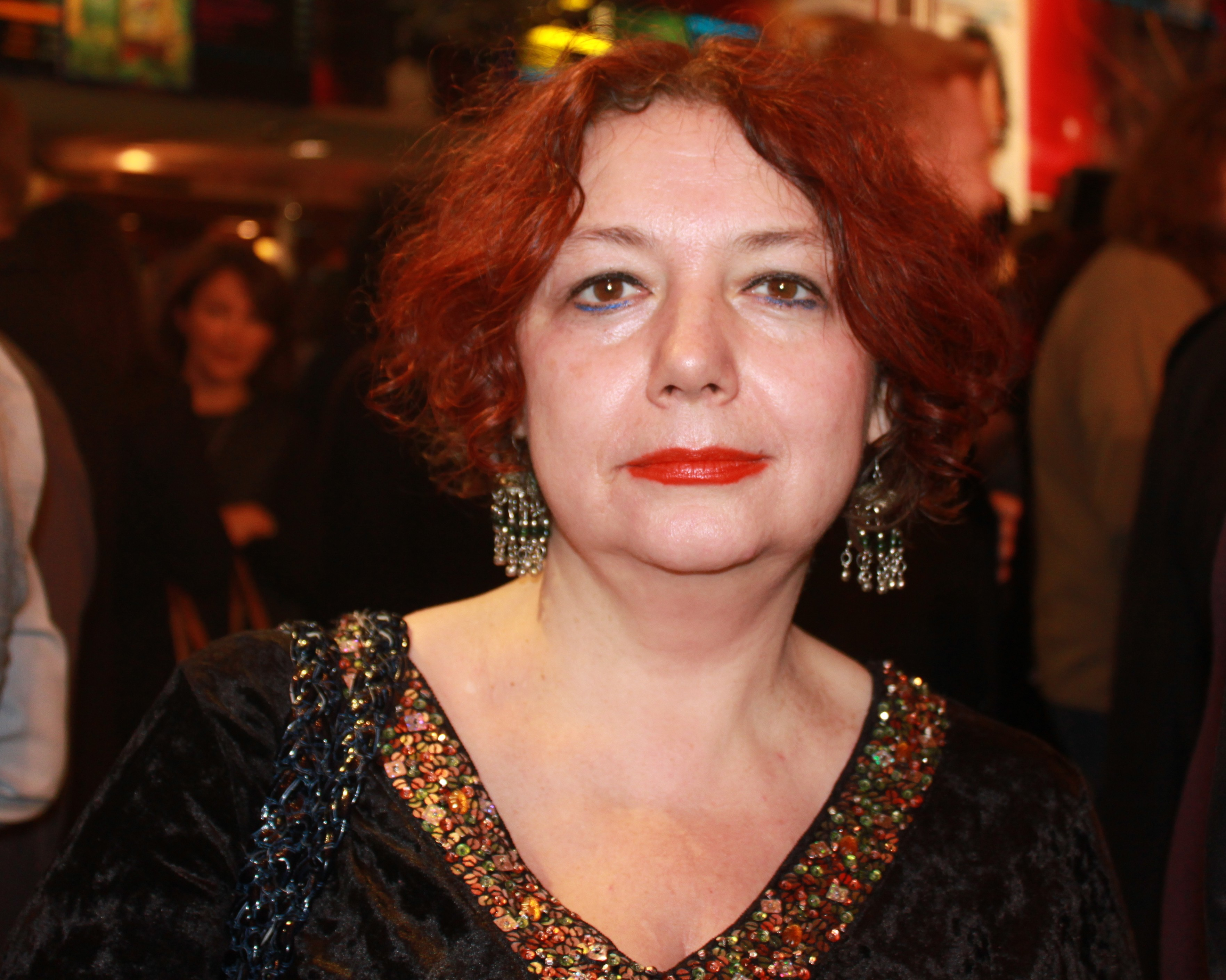 Maria Arbatova (RuNet-2009)